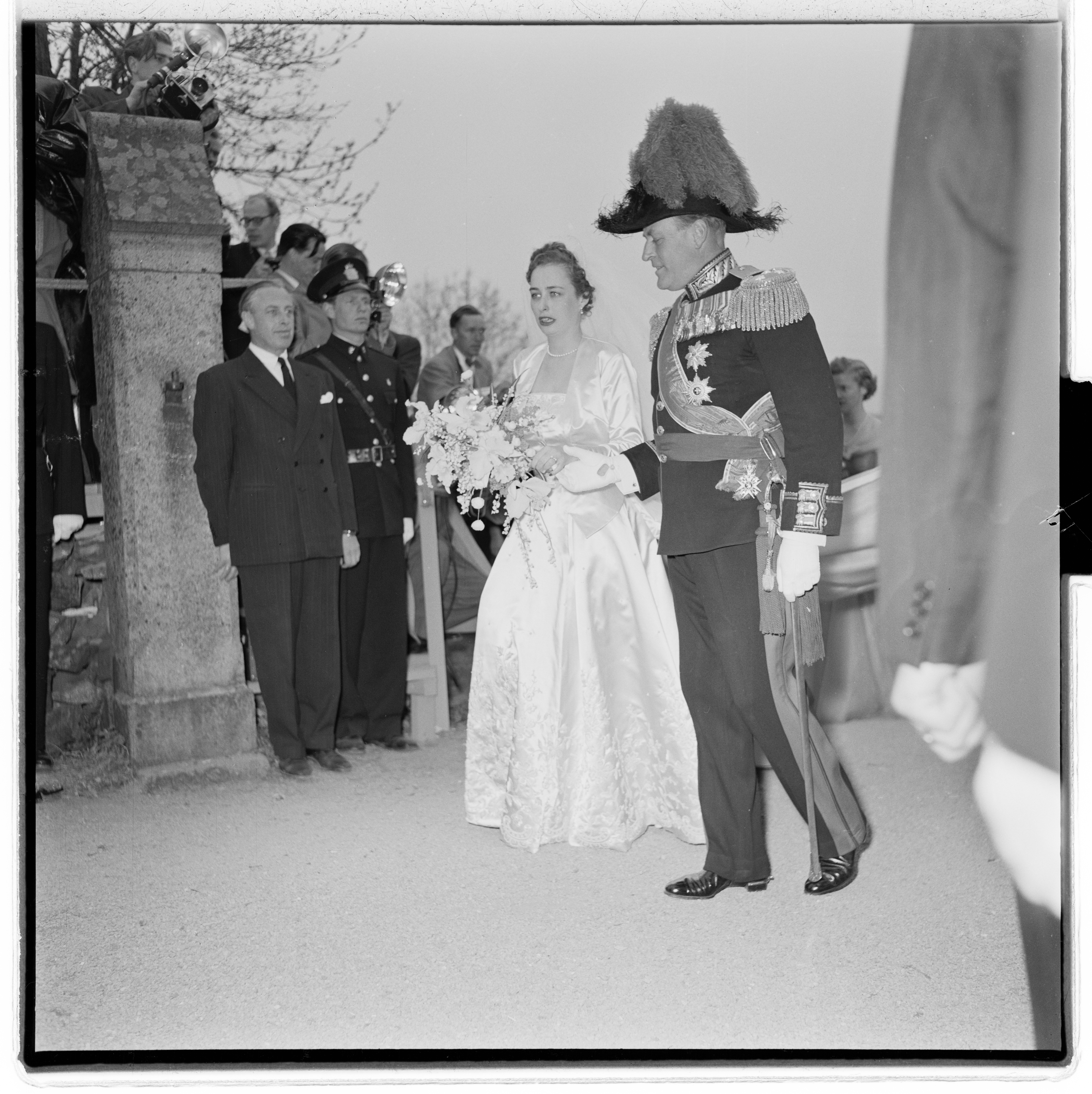 Bildet er hentet fra Arkivverket. Prinsesse Ragnhild ankommer kirken, sammen med sin far, kronprins Olav. Prinsessebryllup 15. mai 1953. Prinsesse Ragnhild og Erling Lorentzen. NÅ nr. 11, 1953. Arkivinstitusjon : Riksarkivet Arkivnavn : Billedbladet NÅ Sted : Norge, Akershus, Asker, Emneord: Bryllup, Kongelige Avbildet